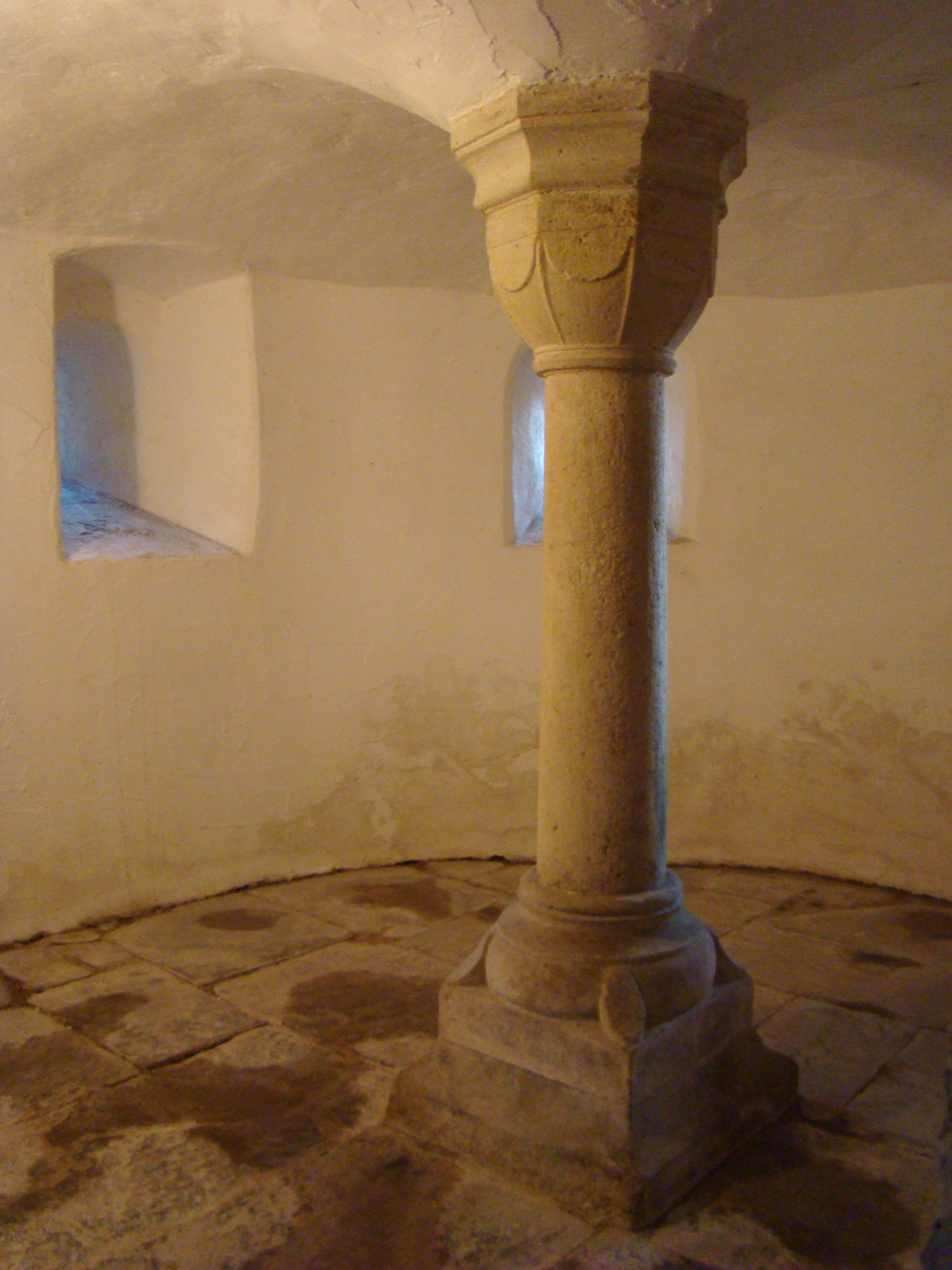 Boxberg-Wölchingen, Frankendom, Krypta